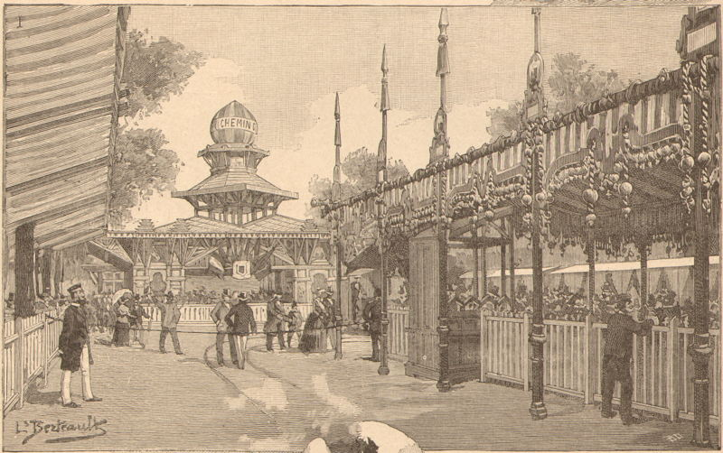 Chemin de Fer-Tramway Decauville de l'Exposition Universelle Paris 1889